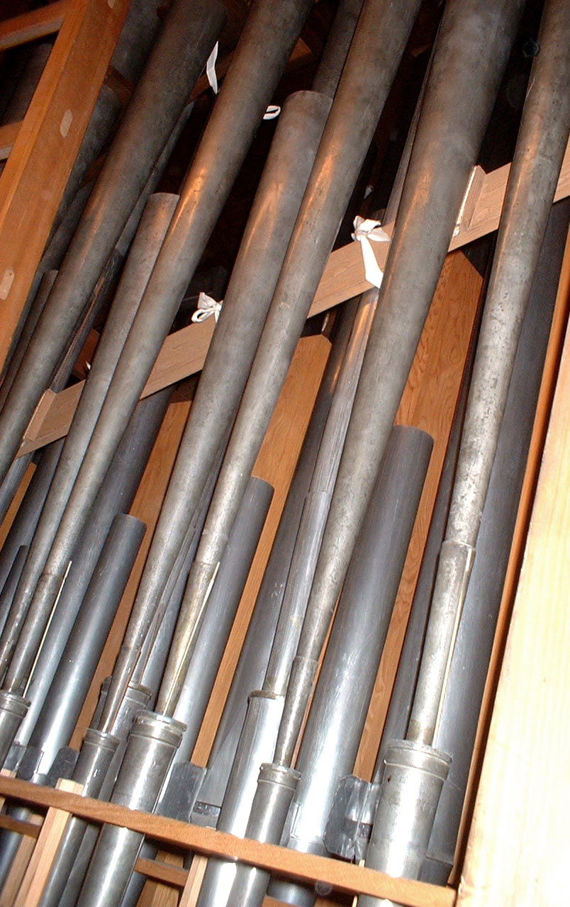 Tuyaux d'orgue (jeux d'anche)